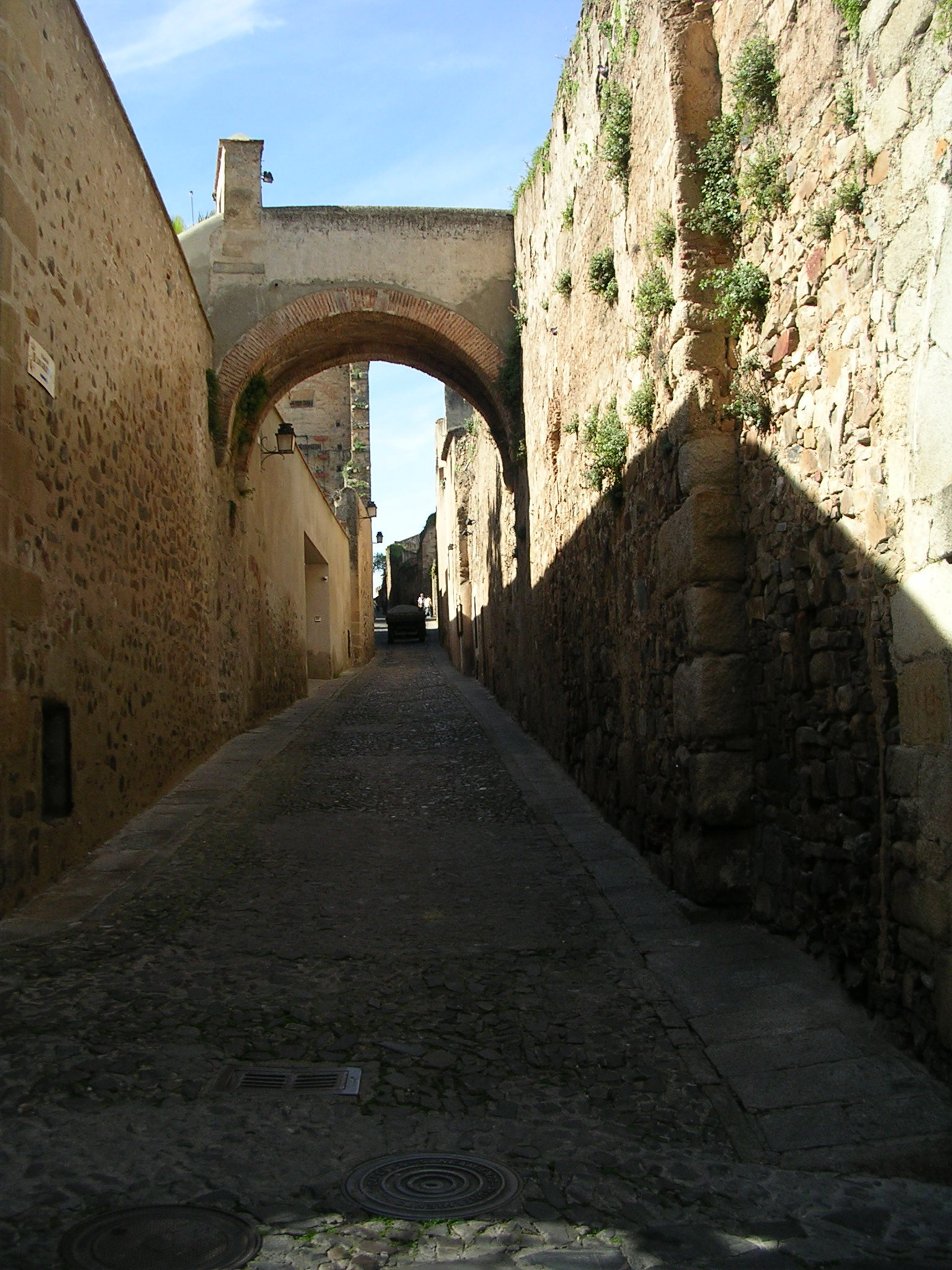 Adarve de la estrella en la ciudad de Cáceres